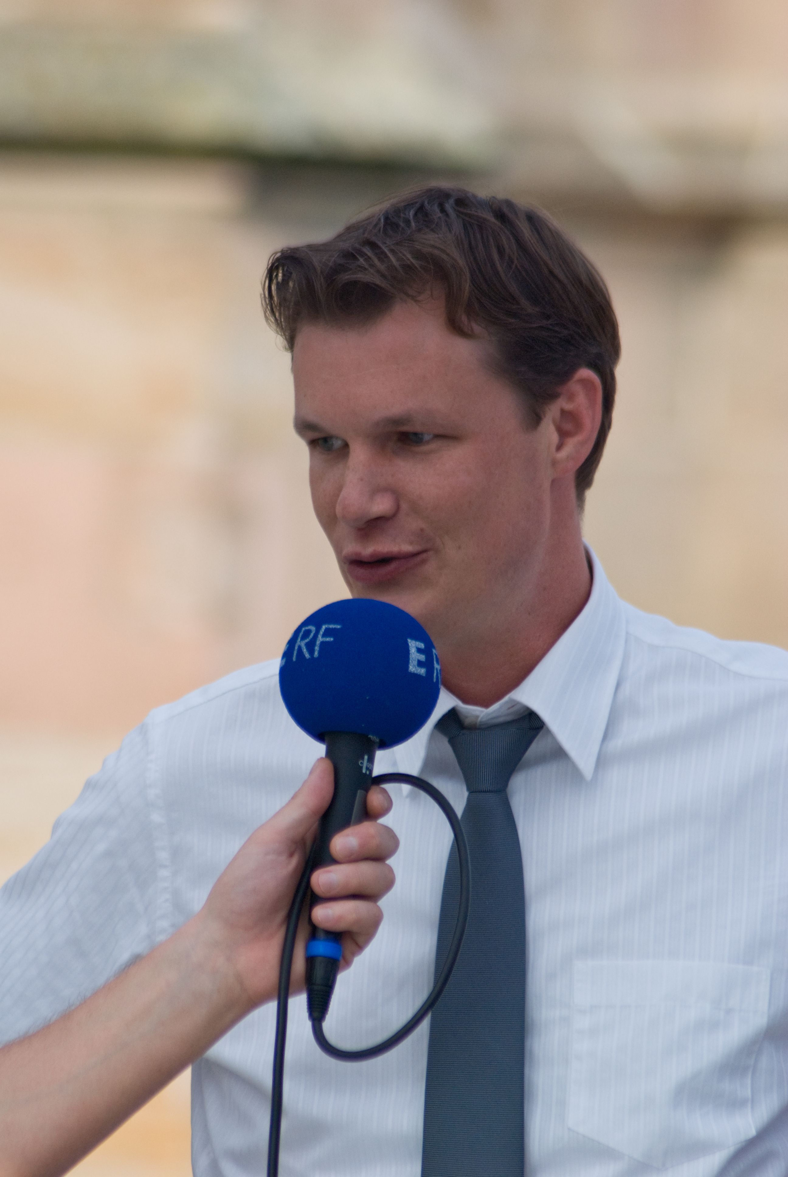 Portrait von Matthias Thürauf